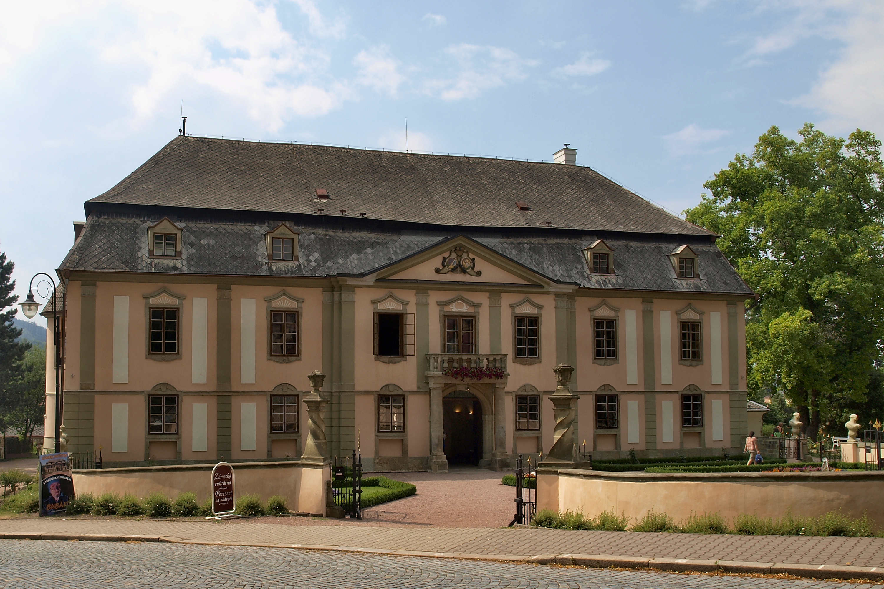 Čelní pohled zámek Potštejn